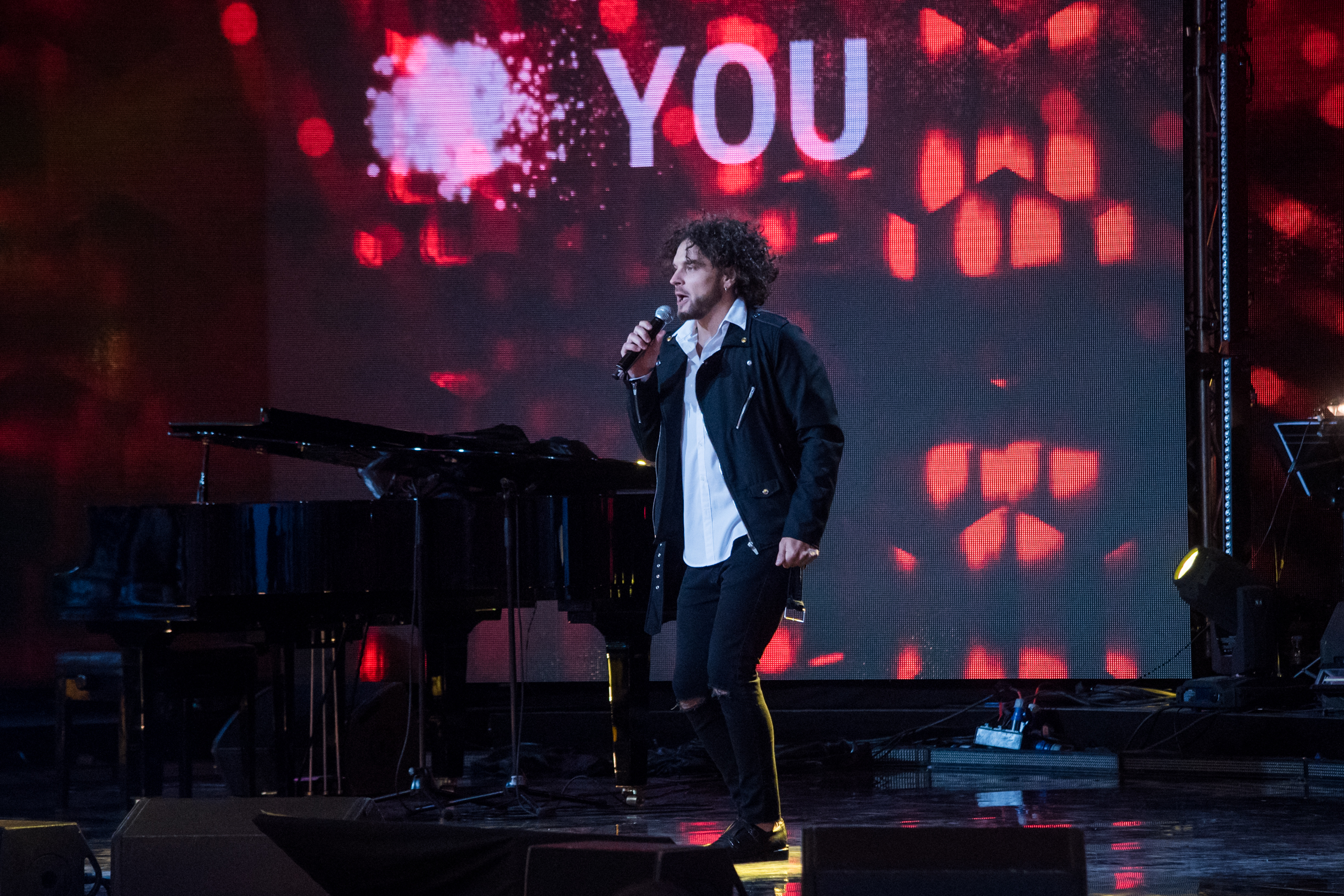 Юзари на фестивале «Лайма. Рандеву. Юрмала 2017»